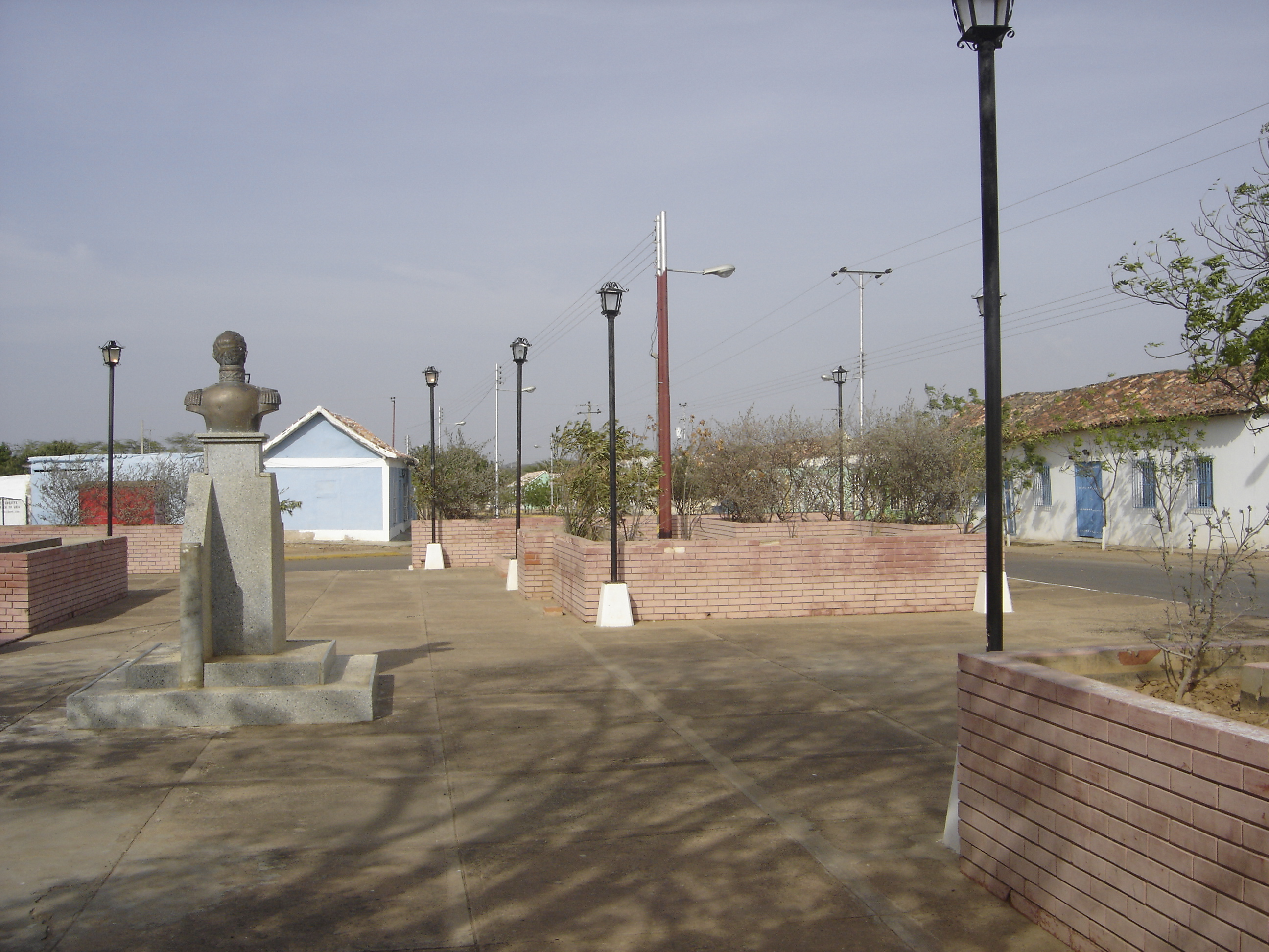 Plaza Bolívar de Urumaco, Estado Falcón, Venezuela.